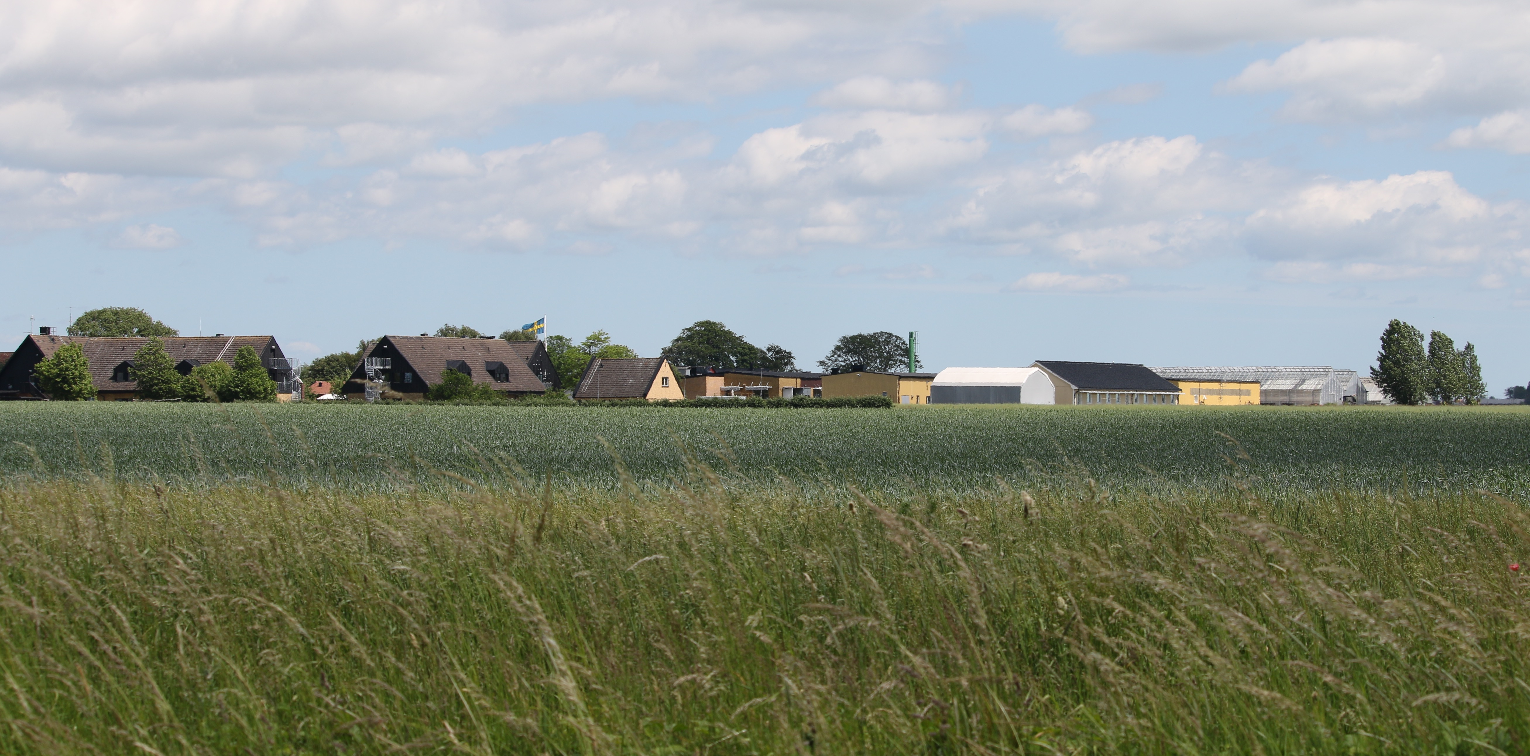 Anstalten Tygelsjö